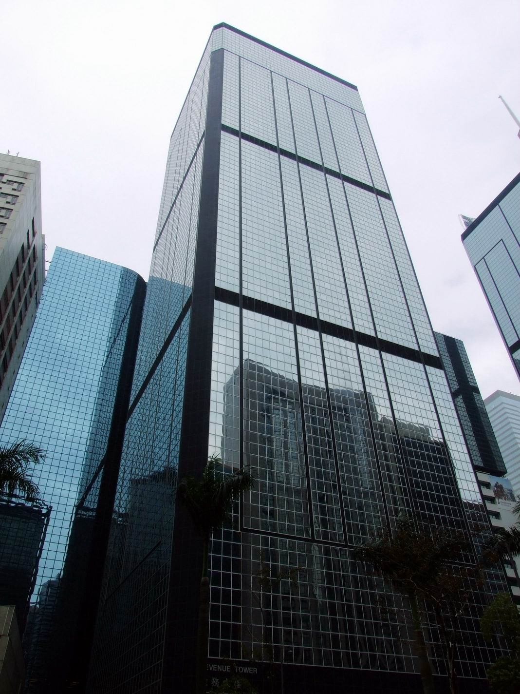 稅務大樓外貌